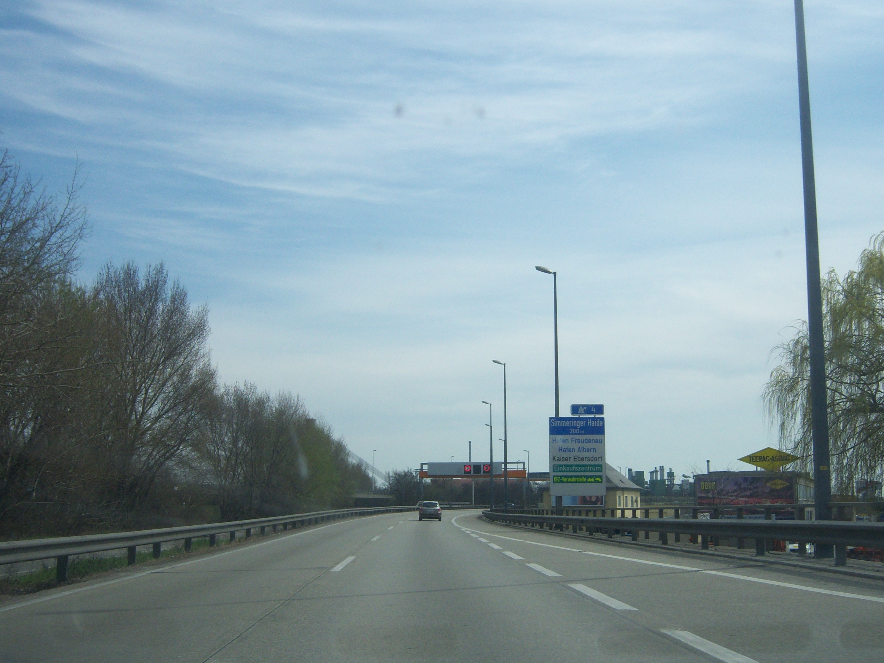 Ost Autobahn A4 im Bereich der Anschlussstelle Simmeringer Haide